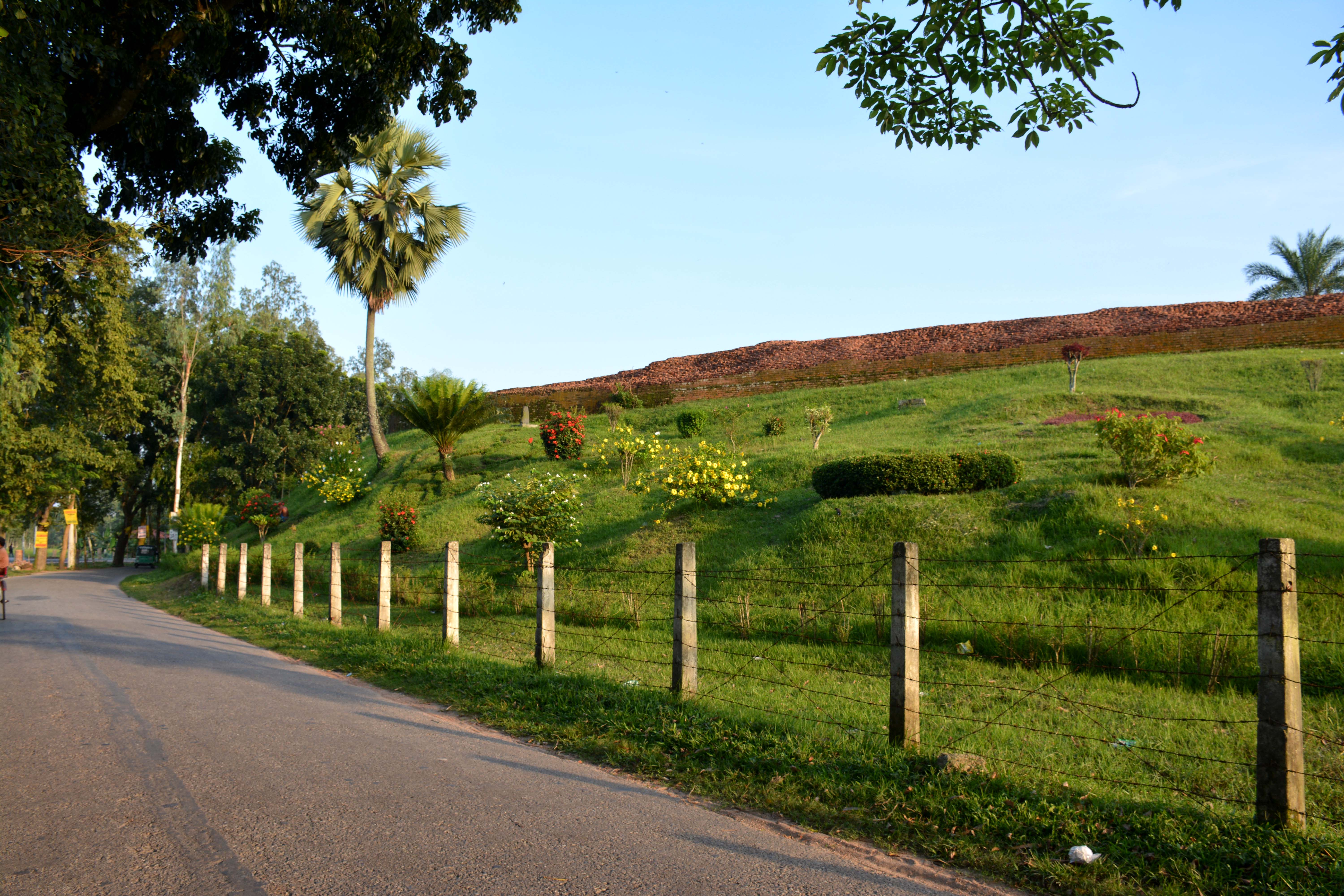 মহাস্থানগড়